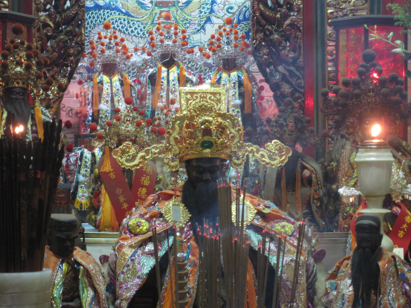 大埔福德祠福德正神神像